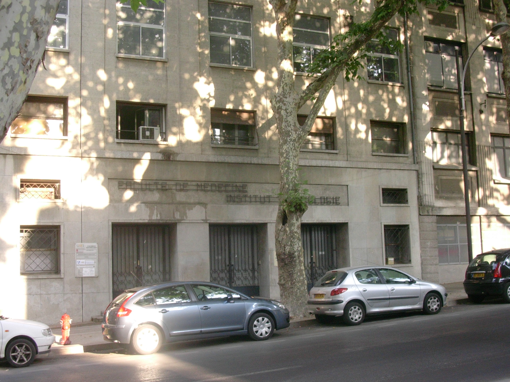 L'Institut de Biologie de Montpellier au Bd Henri IV Photographie personnelle